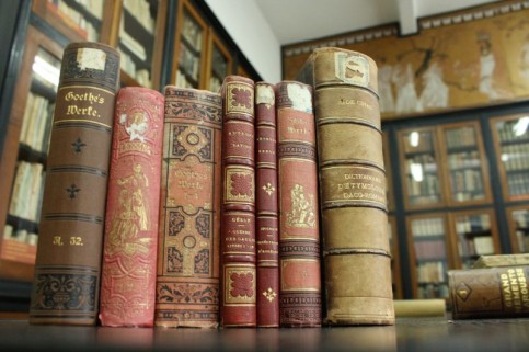 Carti din biblioteca cnu